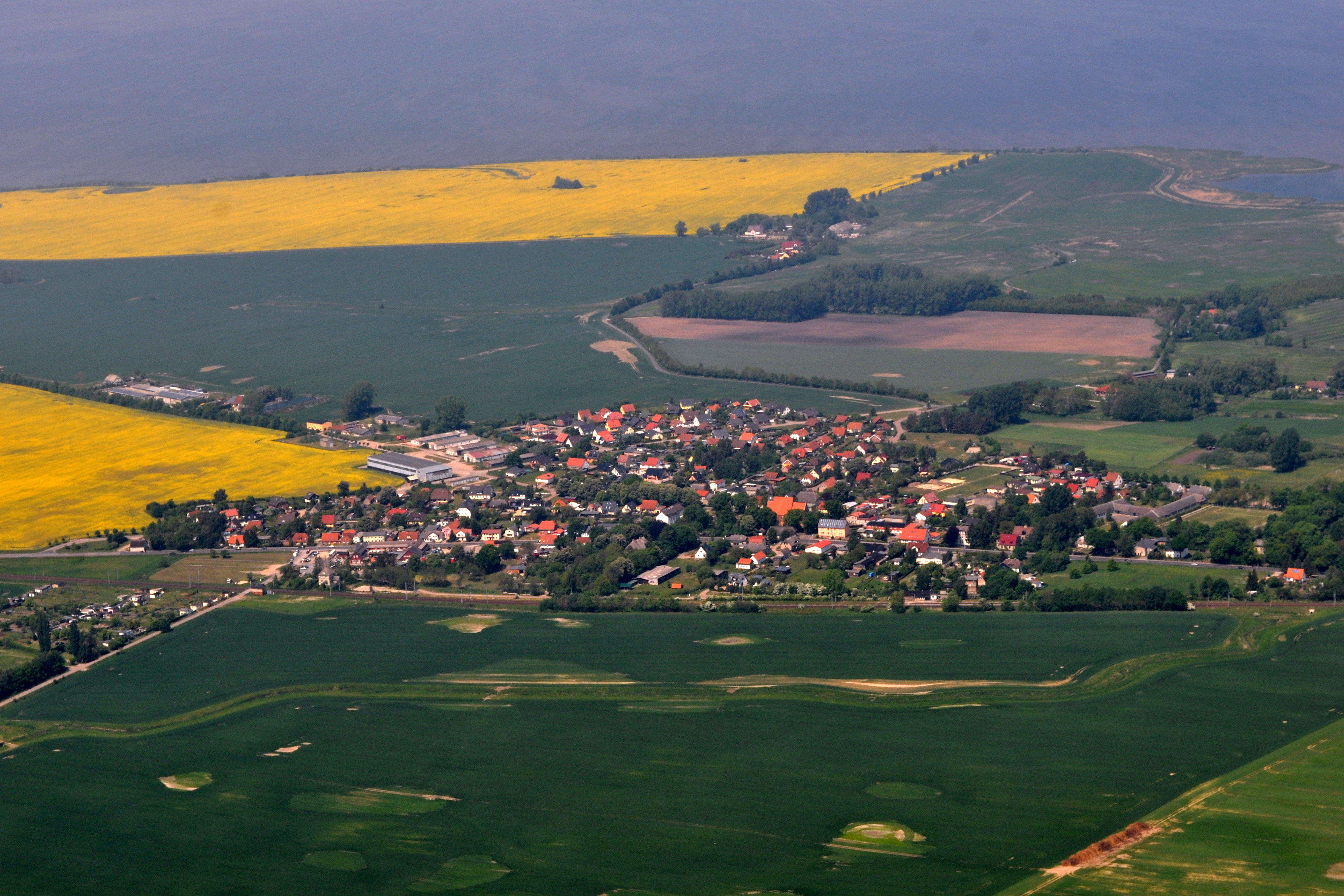 Die Bilder wurden von mir während eines einstündigen Rundflugs ab Flugplatz Güttin am 21. Mai 2011 aufgenommen. Die Bildbeschreibung steht im Dateinamen. Aufgenommen mit einer Nikon D5000 durch das Seitenfenster des Flugzeugs.